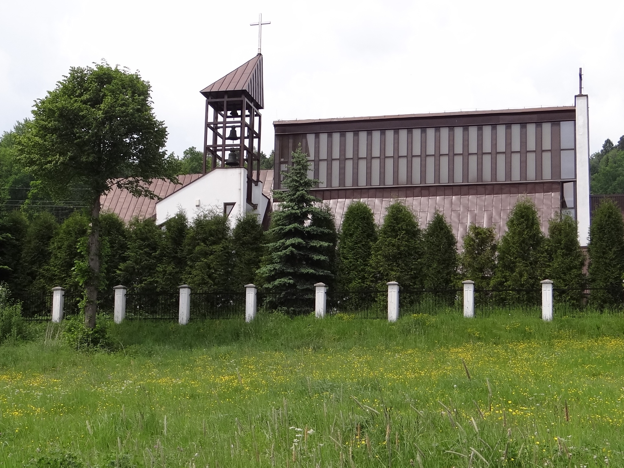 Kościół w Rabie Niżnej